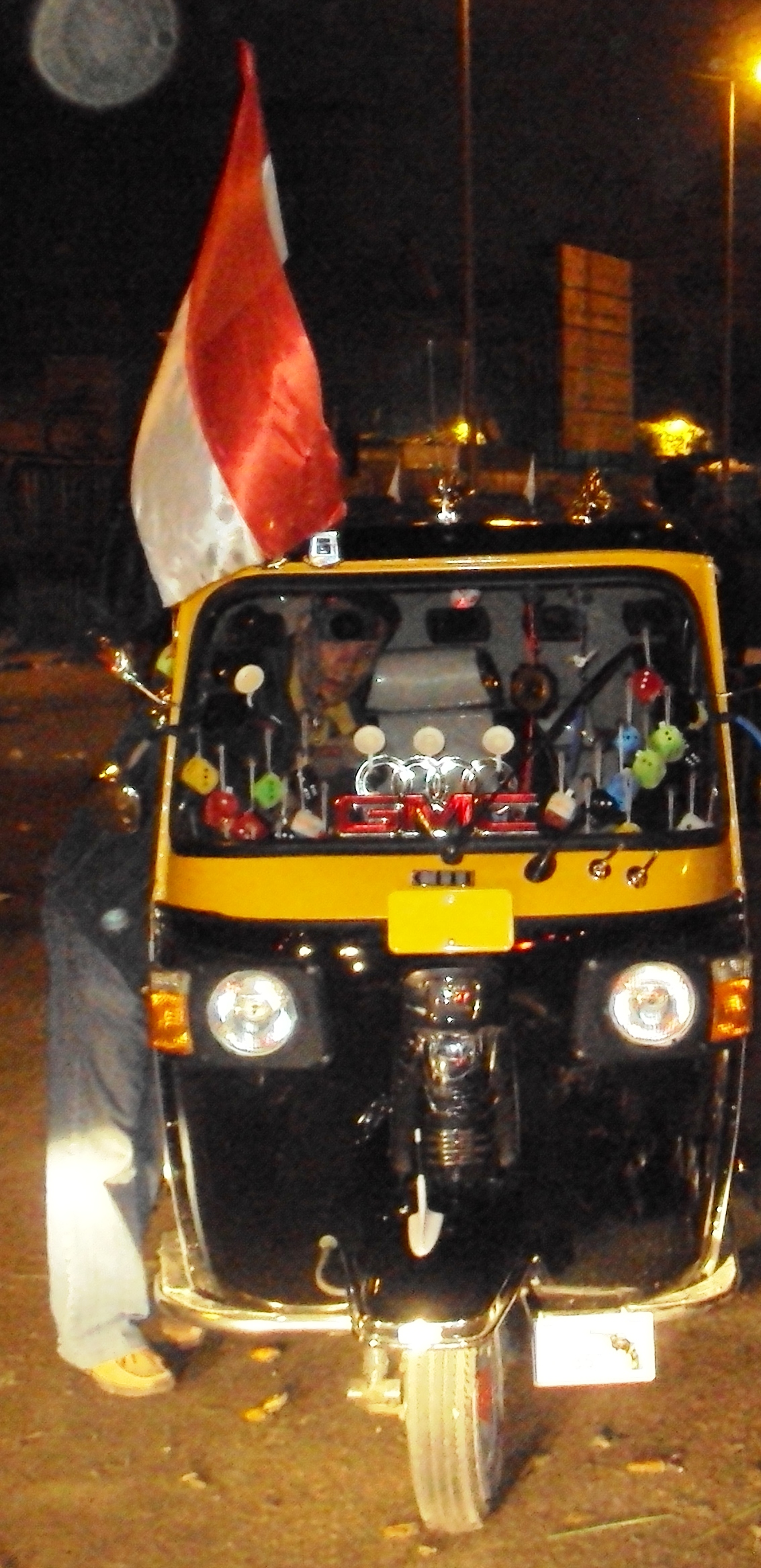 توكتوك في ميدان التحرير بمصر